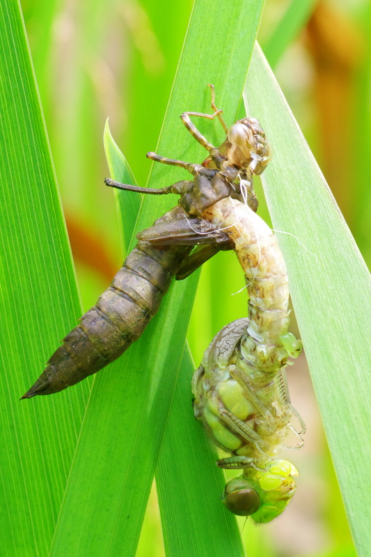 Żagnica sina (Aeshna cyanea) - przeobrażenie. Przez pęknięcie na grzbiecie prawie całkowicie wysunął się tułów, głowa imago, skulone skrzydła i nogi.